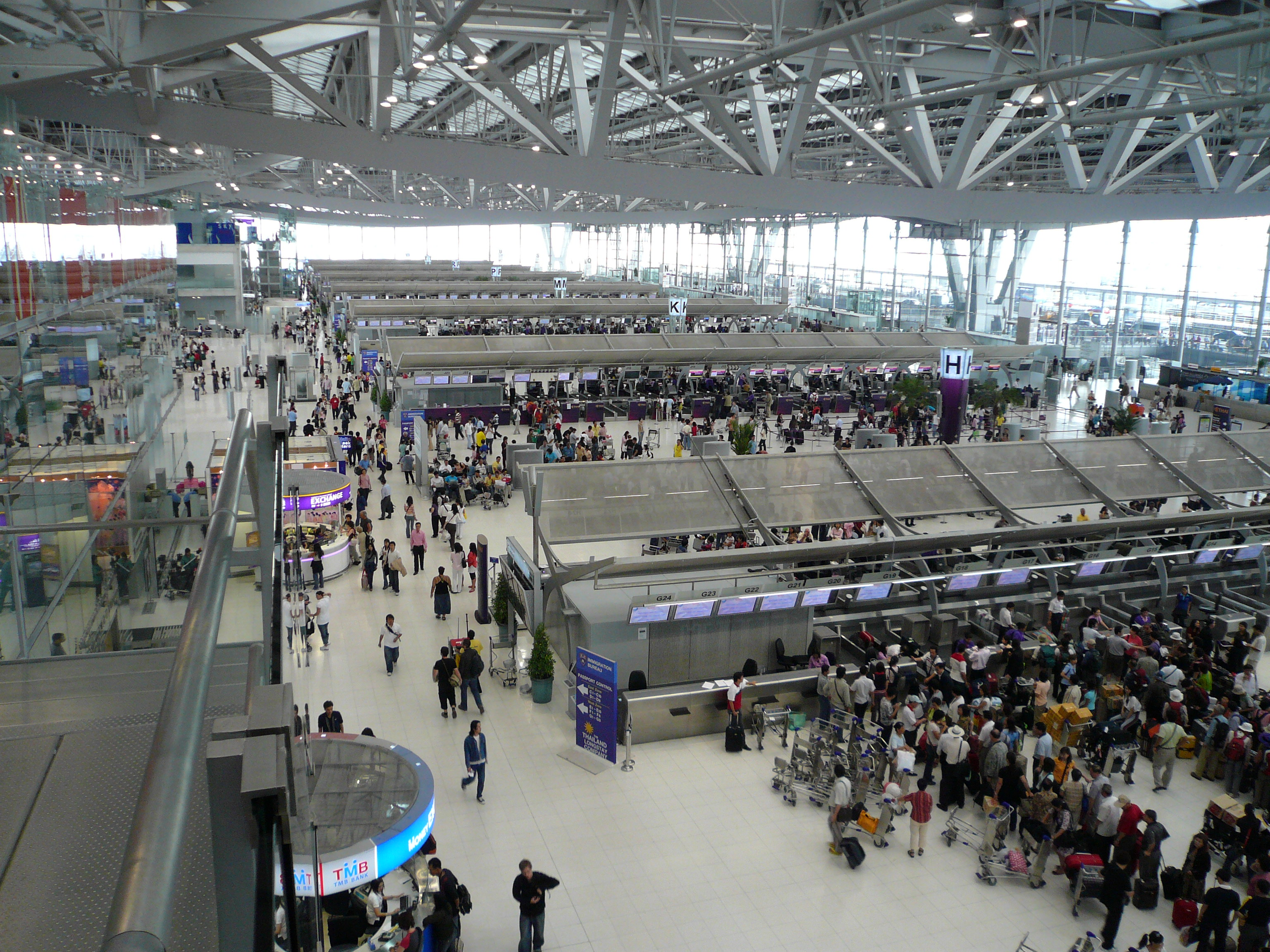 Terminal de l'aéroport international de Bangkok (Suvarnabhumi International Airport)